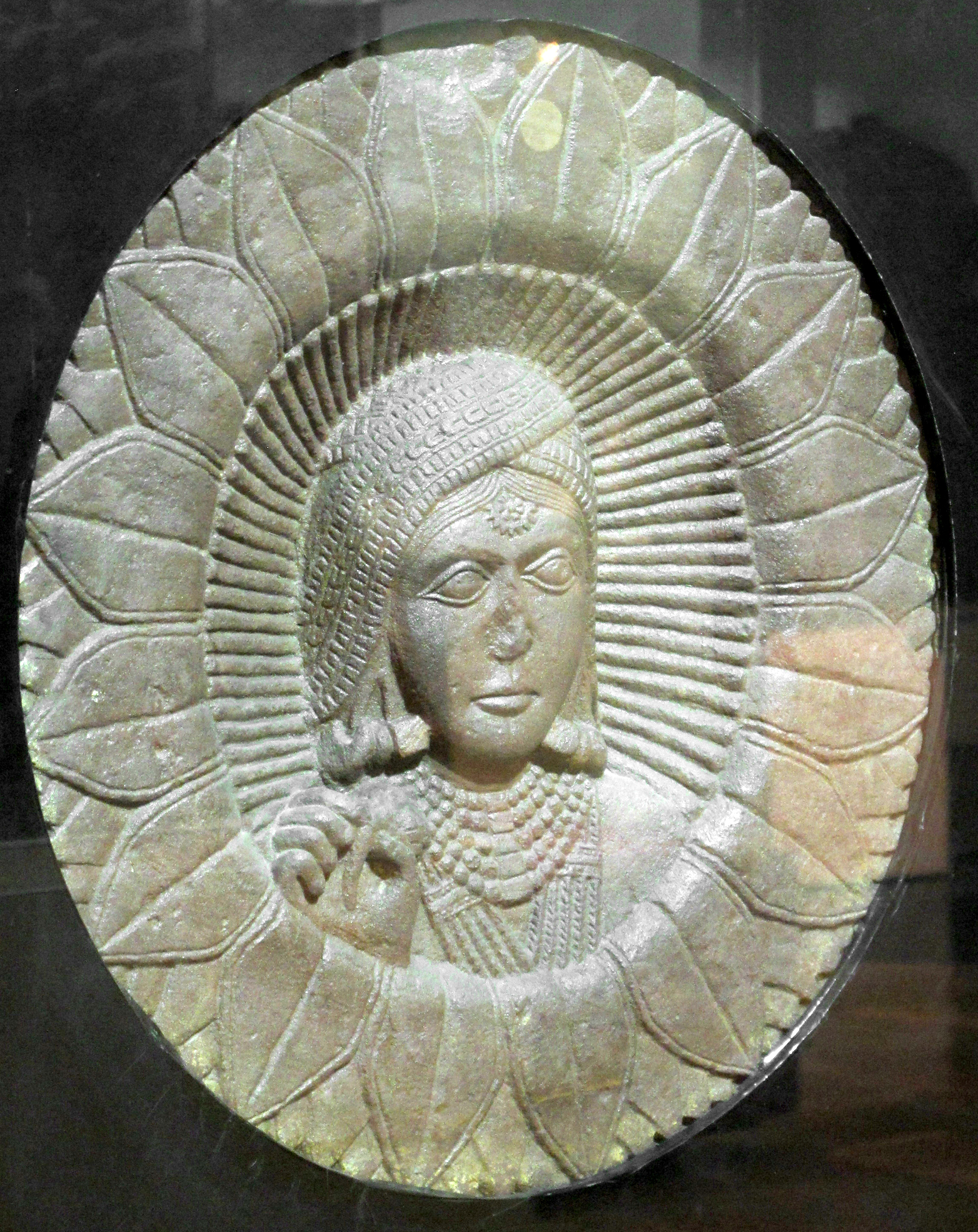 Médaillon de la vedika (ballustrade) de Bharhut (nord de l'état du Madhya Pradesh), district de Satna. Grès, seconde moitié du IIe ou début du Ier siècle avant notre ère. Bhopal Archaeological Museum. Madhya Pradesh.